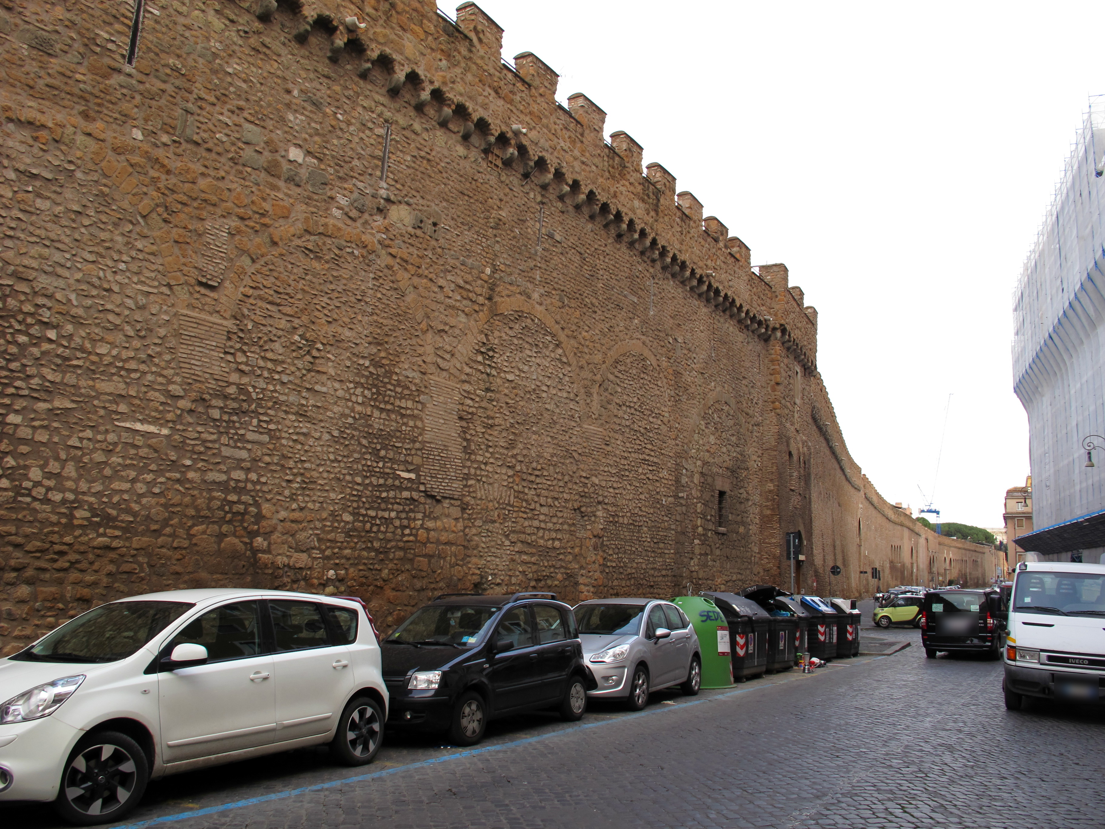 Roma, vedi titoli